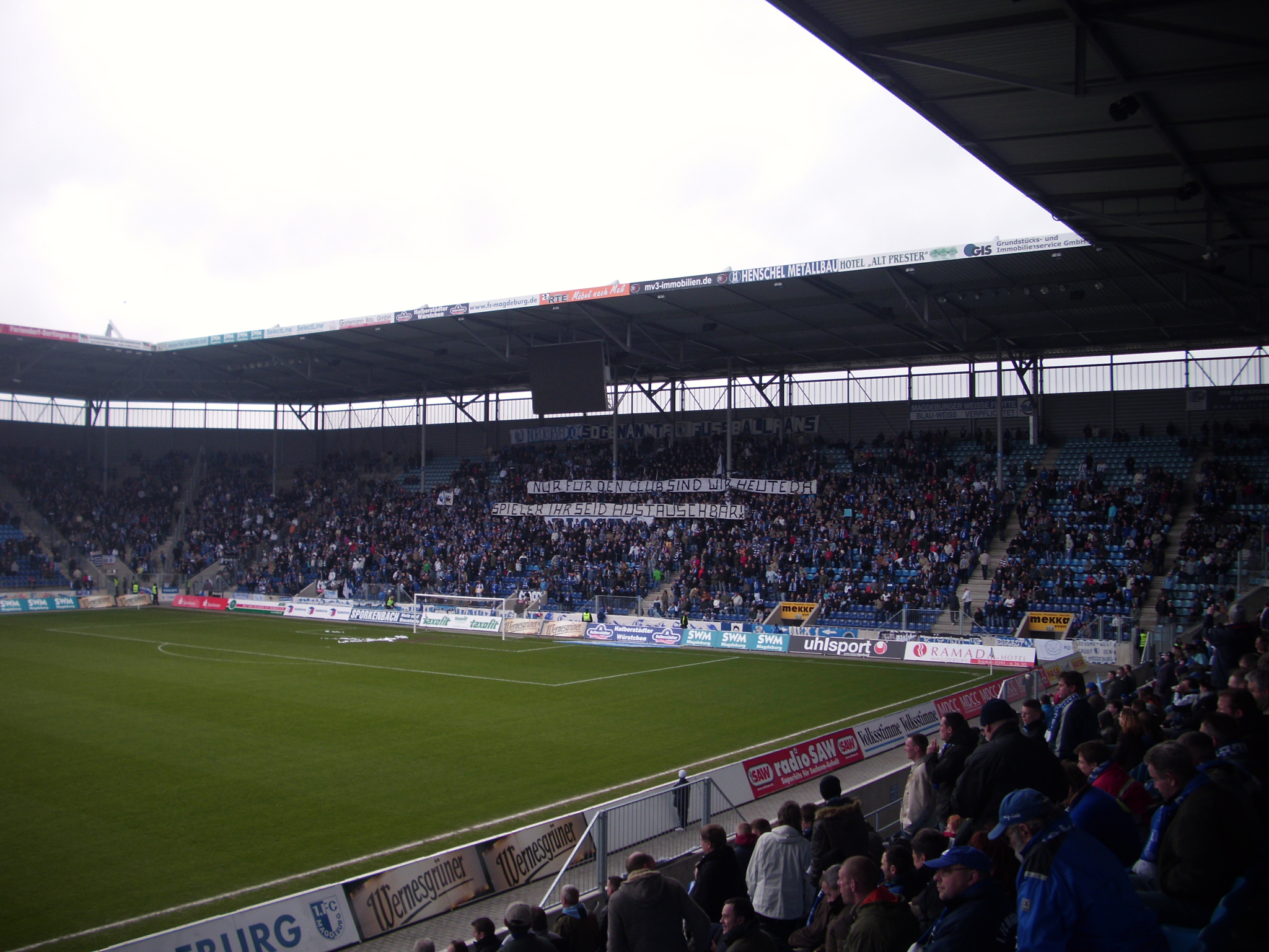 Nordkurve (Block U) des Stadion Magdeburg.